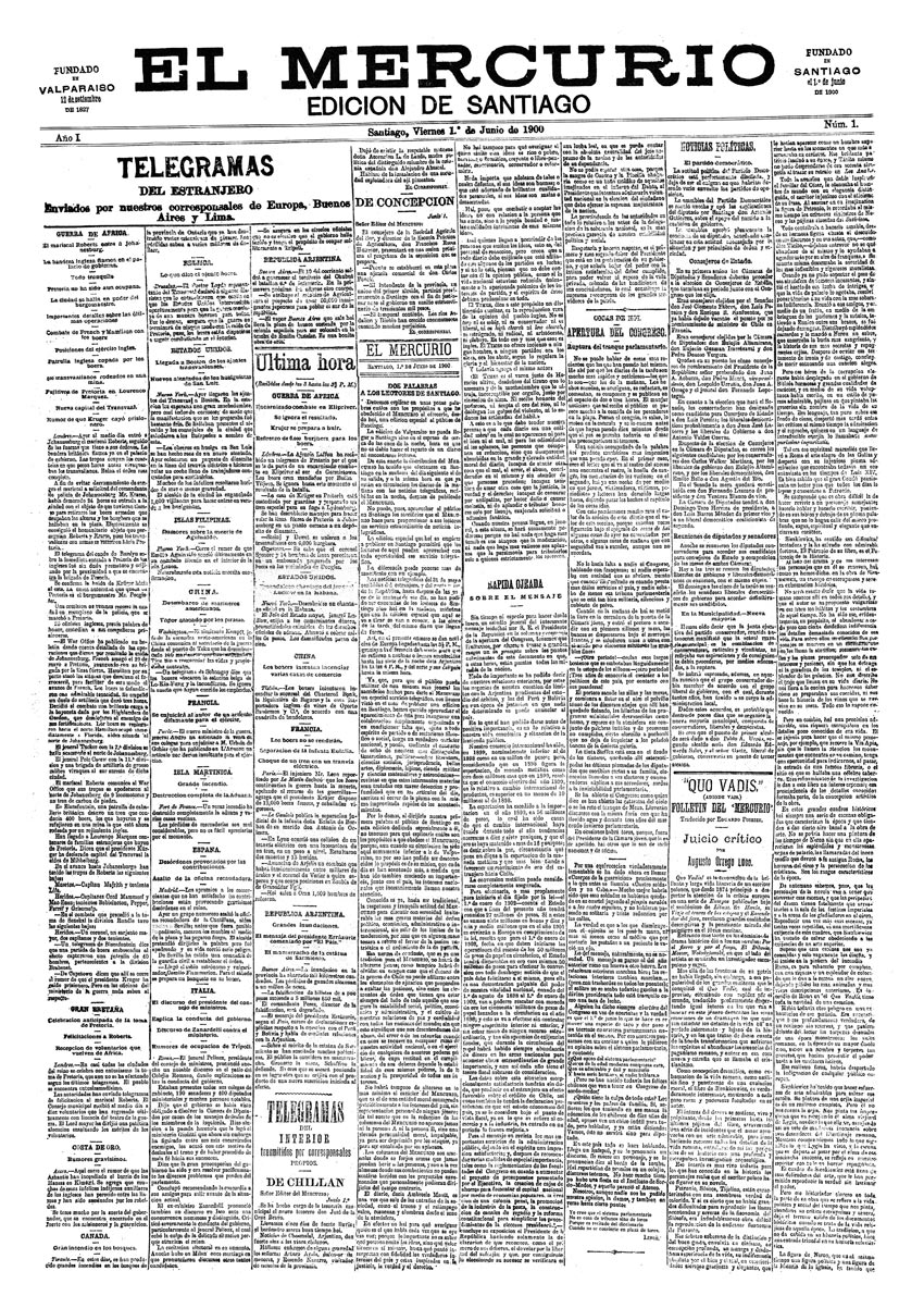 El Mercurio de Valparaíso fue fundado por Pedro Felix Vicuña en 1827 en esa ciudad, sólo 15 años después del primer periodisco nacional, La Aurora de Chile. En 1880 fue adquirido por Agustin Edwards Ross y el 1 de junio de 1900 apareció el primer número para la ciudad de Santiago.